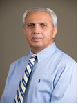 ד"ר רמי סולימני, מנכ"ל אשלים